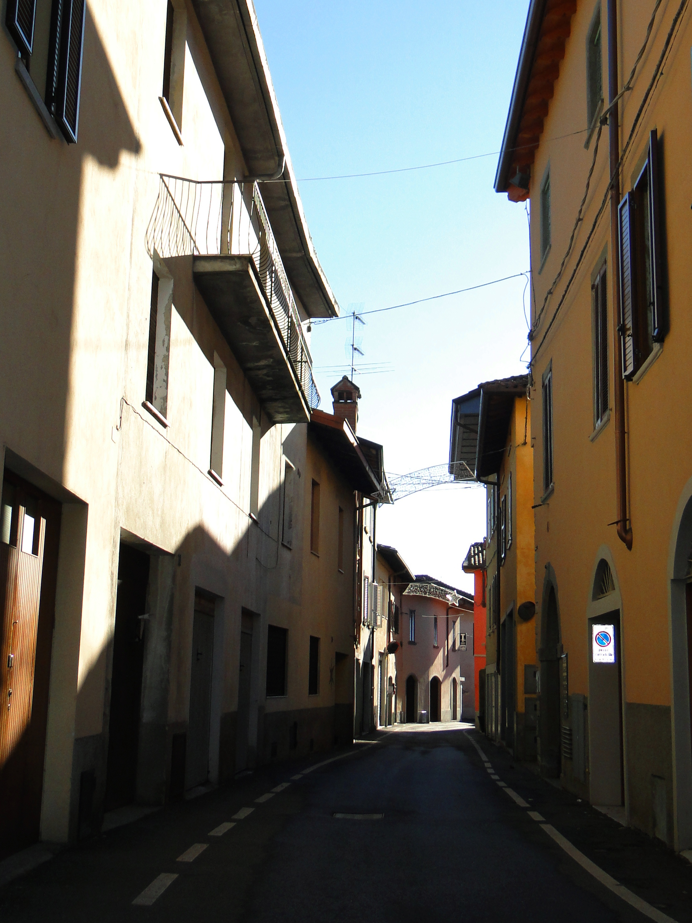 Nese, fraz. di Alzano Lombardo (BG). Centro storico